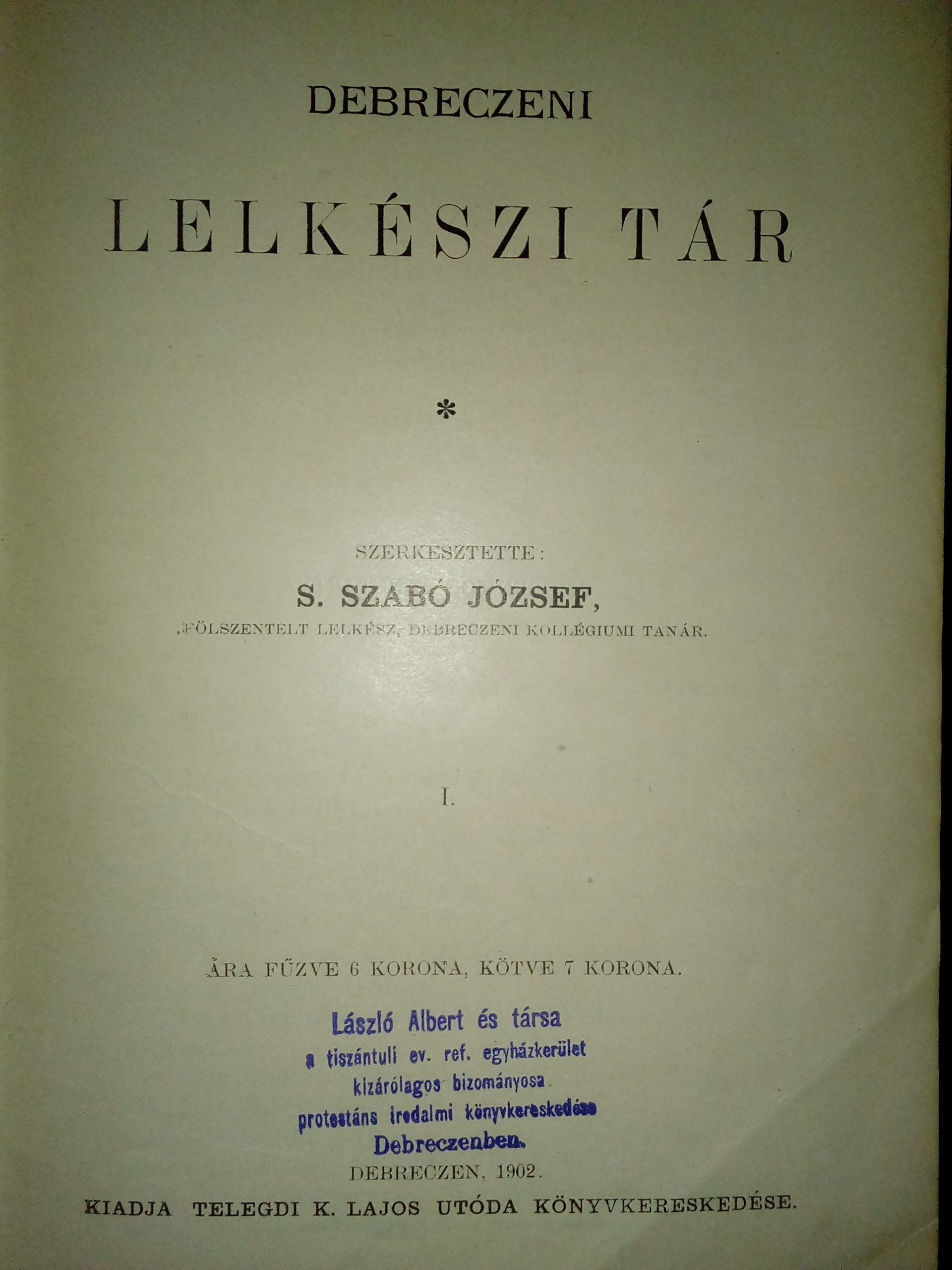 Az adott mű címlapja.